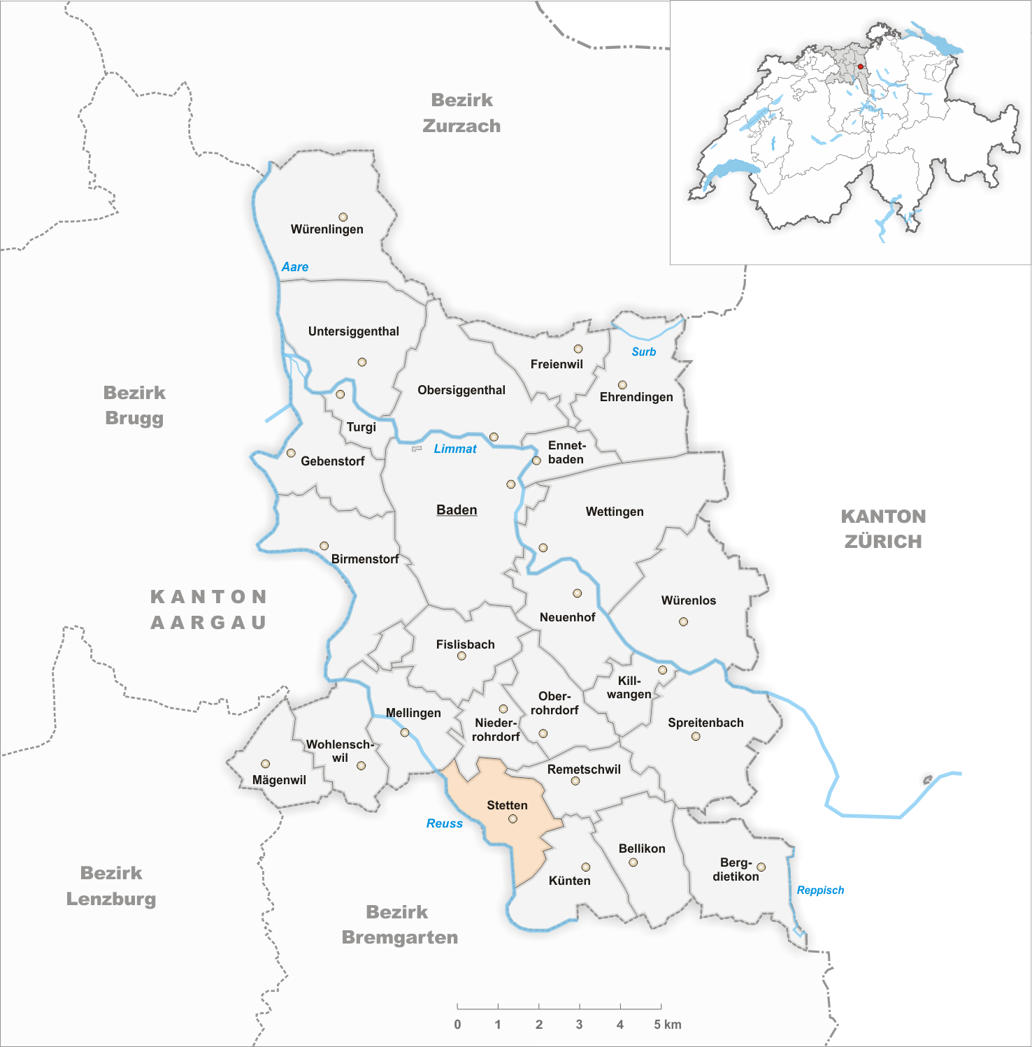 Municipality Stetten